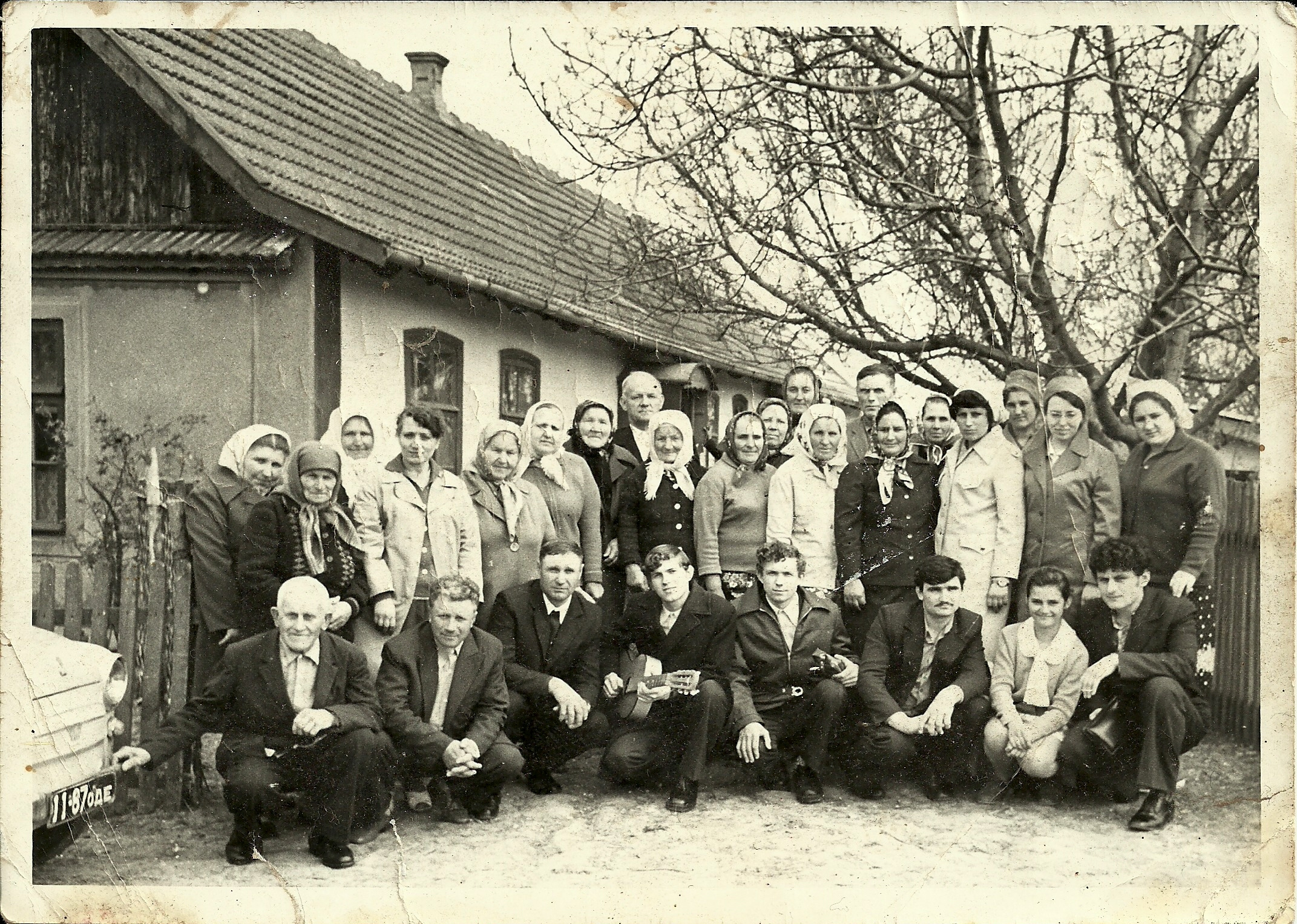 Церква євенгельських християн баптистів у Косовці, Білгород-Дністровський район Одеської області. 30 квітня 1978 р., Свято Великодня Воскресіння Христового